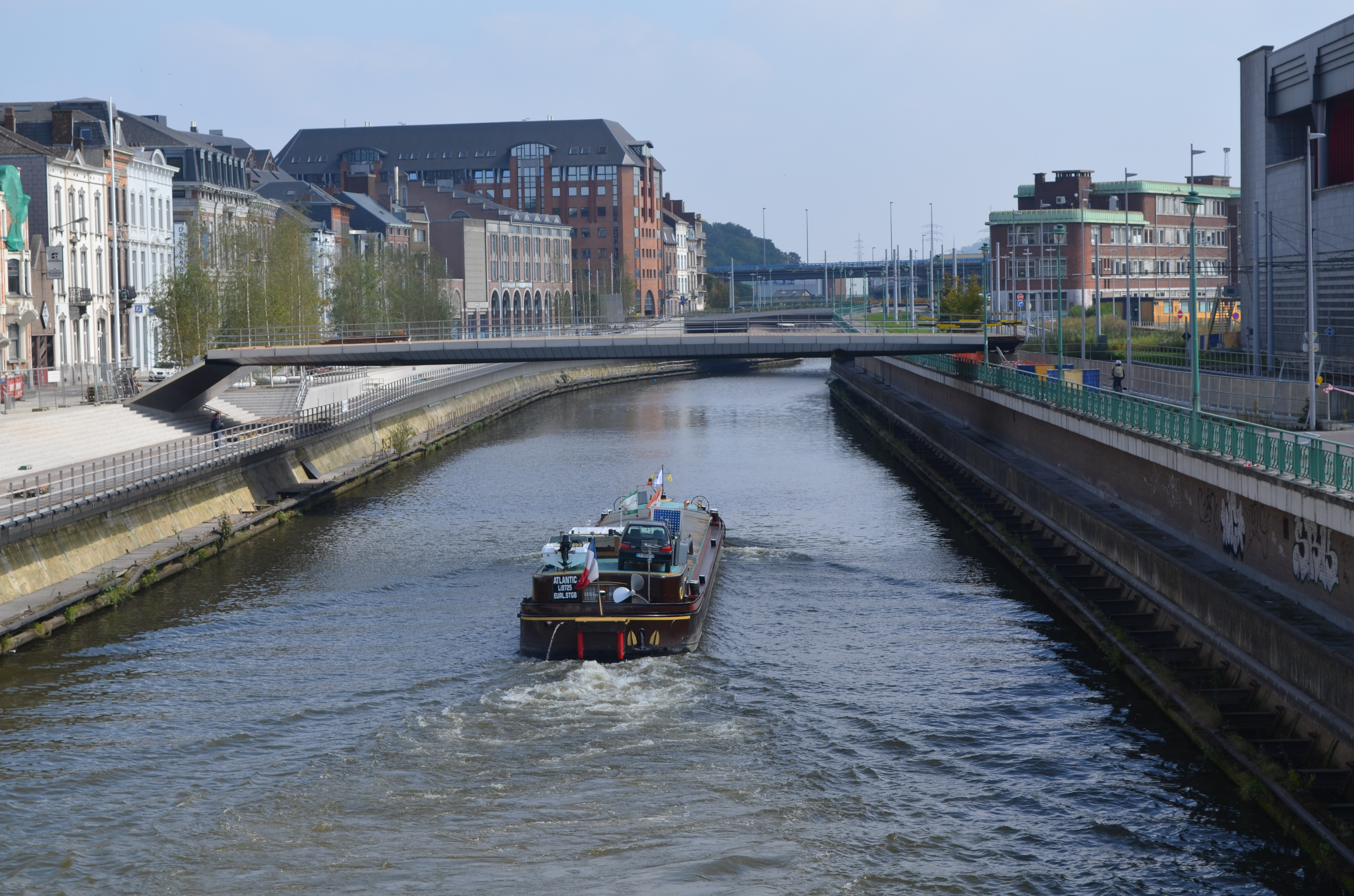 Charleroi (Belgique) - Péniche « Atlantic » (Li9725 F) sur la Sambre au niveau du Quai de Brabant.